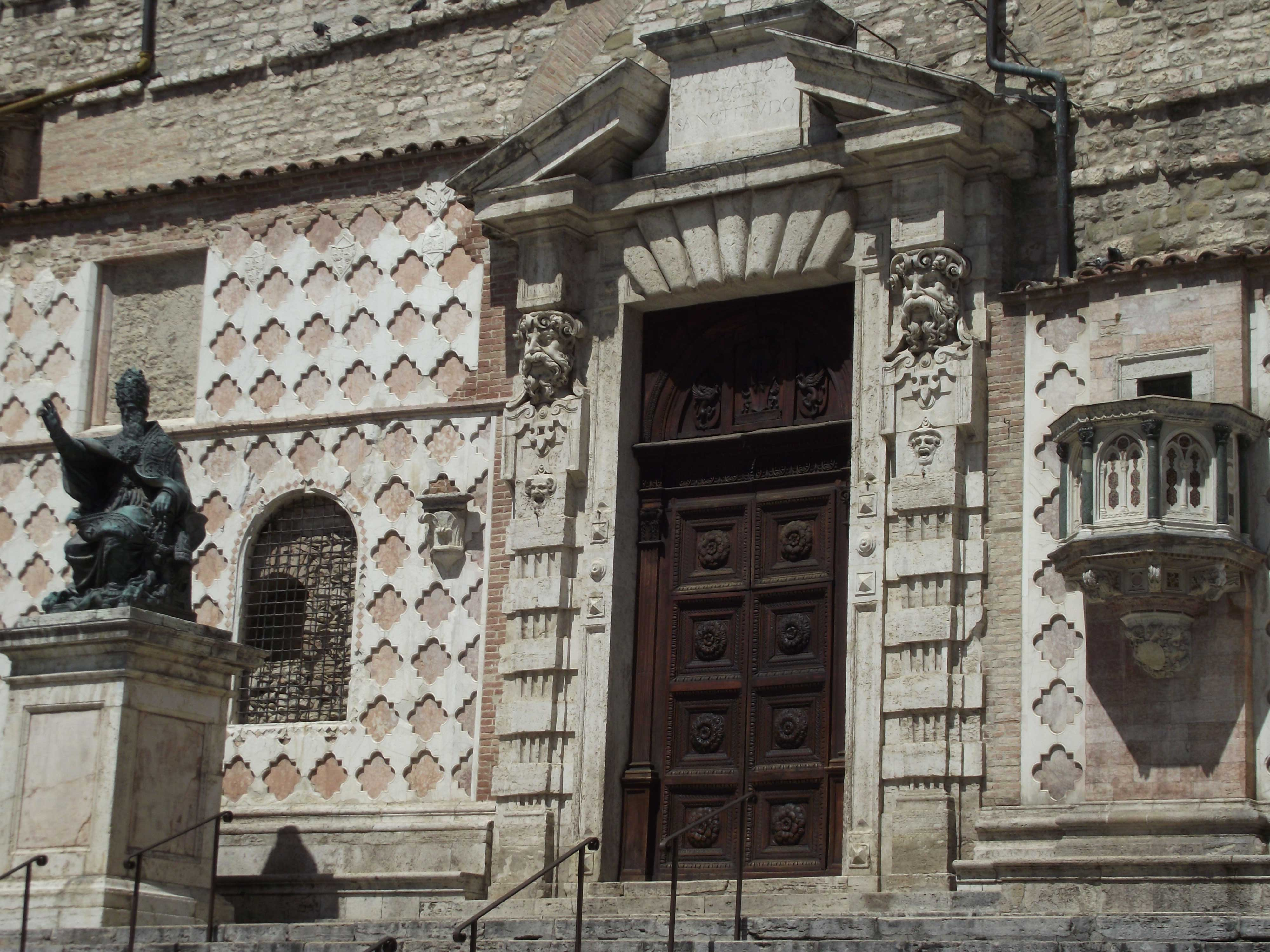 Perugia, Duomo di San lorenzo